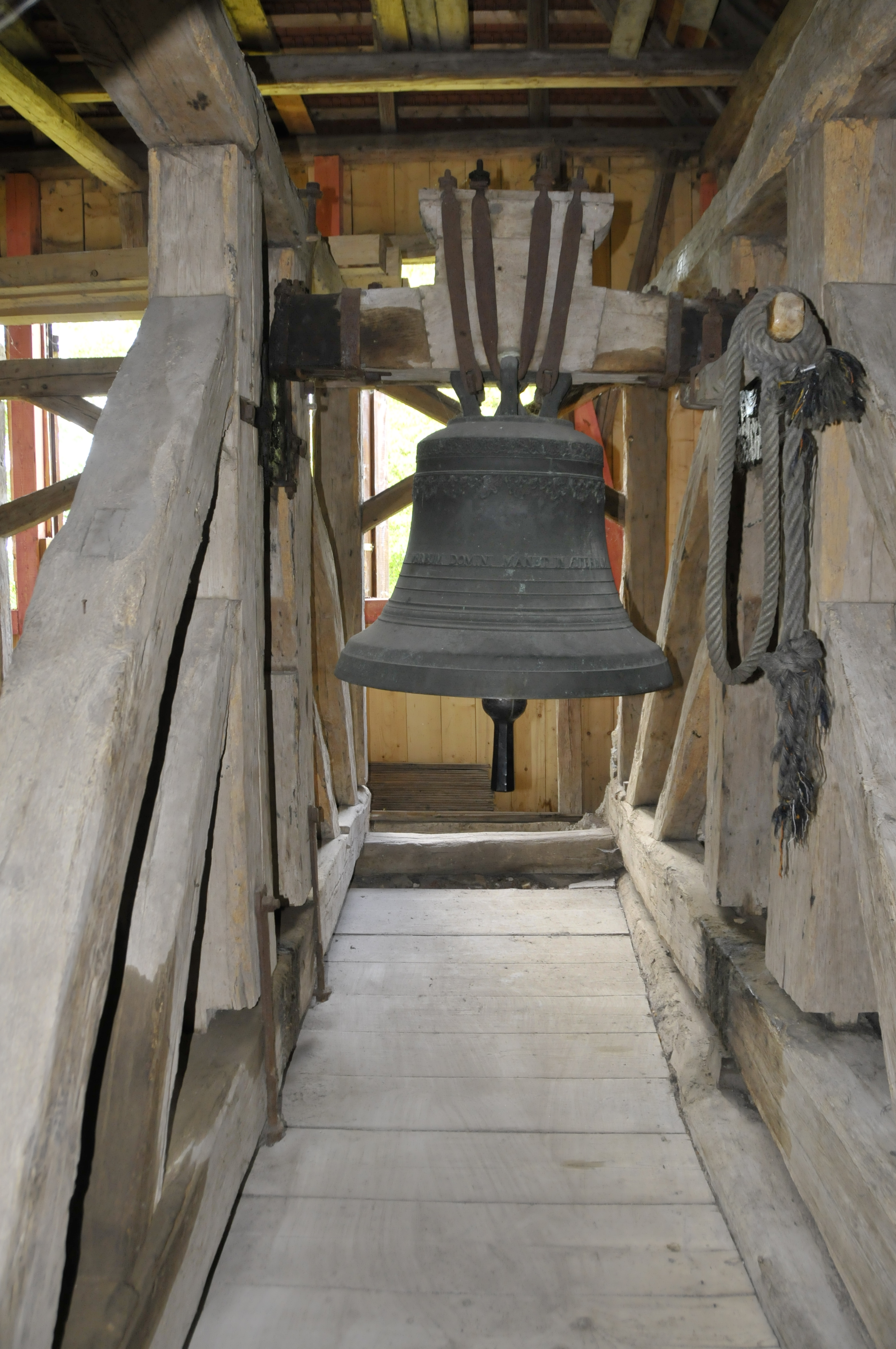 Alkersleben, Glockenhaus der Kirche